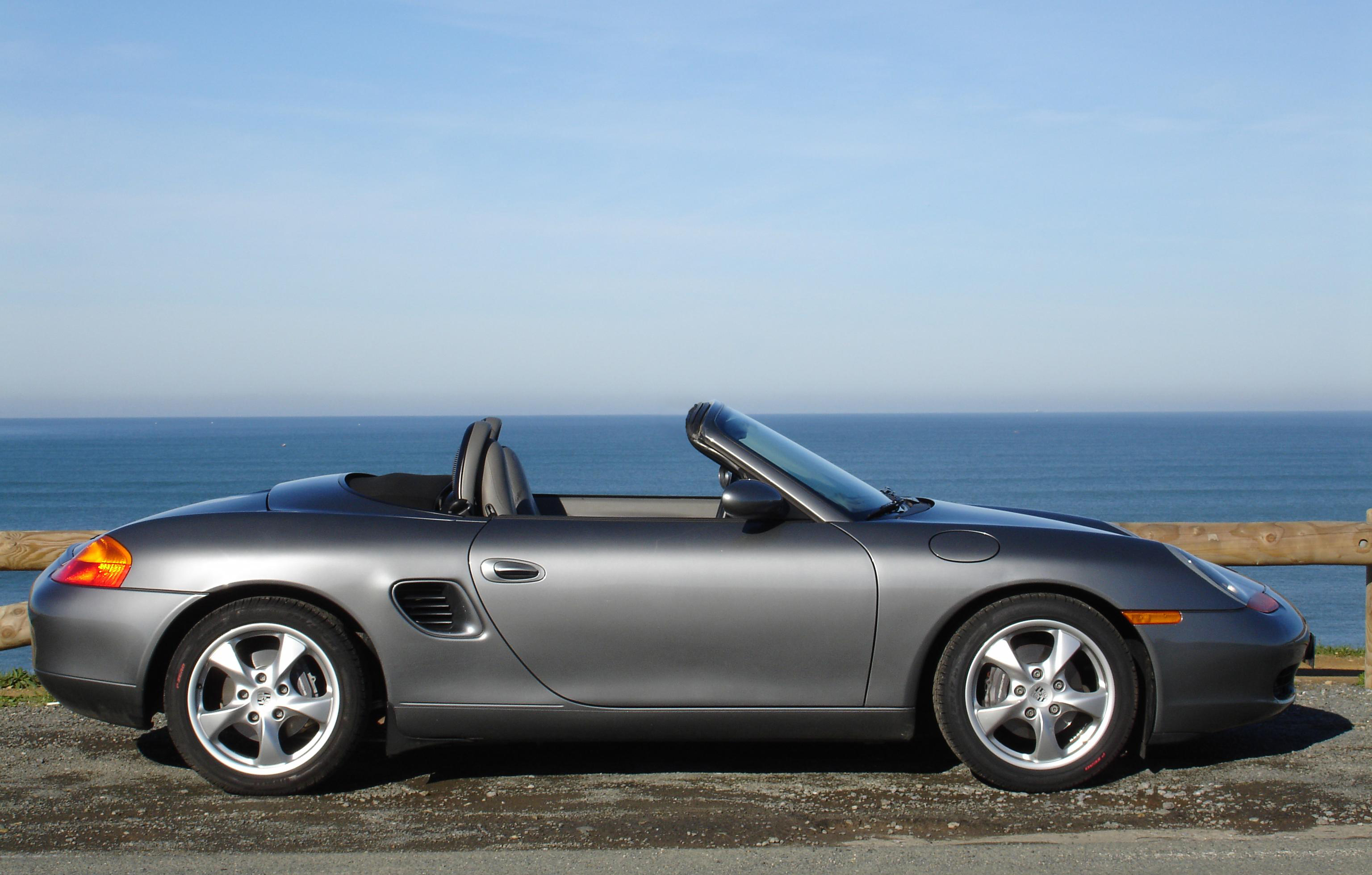 Porsche Boxster 2,7 l, 228 ch, modèle 986, année 2002, gris Kerguelen